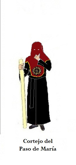 Penitente de sección de penitencia del Apostolado de la Oración de San Francisco